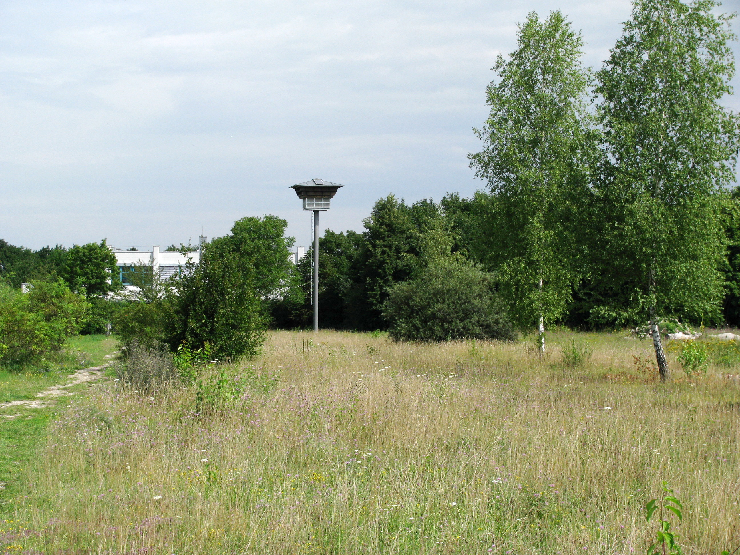 Ehemaliges Virginia-Depot mit Brutturm für Turmfalken, Mauersegler und Dohlen.